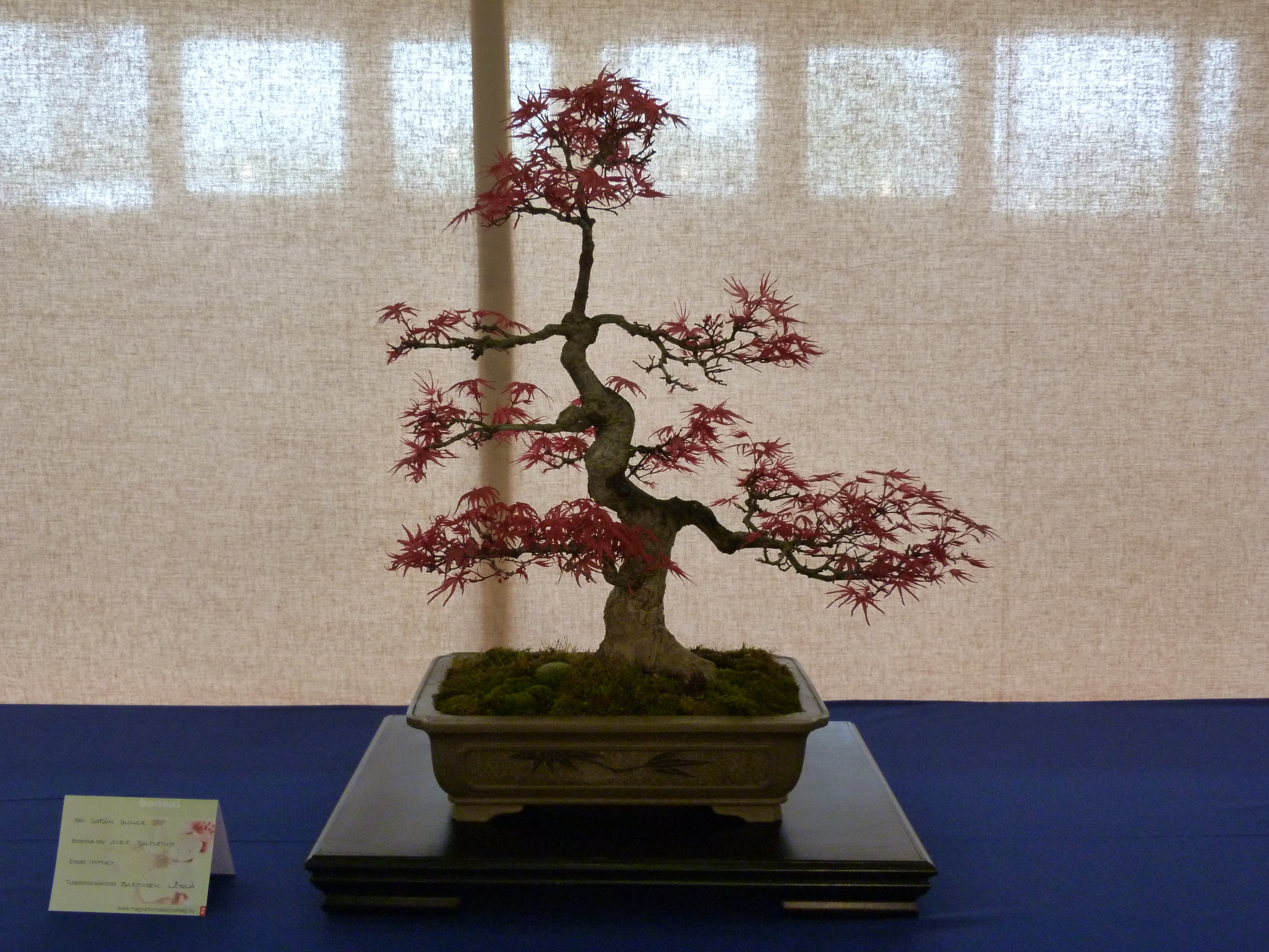 A felvétel 2015. április 17-én pénteken készült Budapesten. Construma Kert. A Magyar Bonsai Szövetség kiállítása. 1. Olajfa, latin neve: Olea Europea, eredete: Yamadori, tulajdonos/alakította: Bartusek László 2. Keskenylevelű fagyal, Ligustrum Ovalifolium, Yamadori, Baumann Attila 3. Kocsányos tölgy, Quercus Robur, Yamadori, Néder András 4. Hárs, Tilia Cordata, Yamadori, Bartusek László 5. Japán fekete fenyő, Pinus Thunbergi, Import, Bartusek László 6. Japán juhar, Acer Palmatum, Import, Bartusek László 7. Háromerű juhar, Acer Buergerianum, Import, Bartusek László 8. Japán ciprus, Criptomeria Japonica, Import, Bartusek László 9. Fehér bükk, Fagus Crenata, Import, Bartusek László 10. Japán juhar, Acer Palmatum, Import, Bartusek László 11. Háromerű juhar, Acer Buergerianum, Import, Bakon Pál 12. Kínai boróka, Juniperus Chinensis, Import, Bakon Pál 13. Japán birs, Pseudosydonia Japonica, Import, Bakon Pál 14.Mezei juhar, Acer Campestre, Yamadori, Bakon Pál 15. Madárbirs, Cotoneaster Horizonria, Faiskola, Baumann Attila 16. Japán fehér fenyő, Pinus Parvaflora, Import, Deutsch Károly 17. Erdei fenyő, Pinus Sylvestris, Yamadori, Czégel Richárd 18. Gyertyán erdő, Carpinus Betulus, Yamadori, Czégel Richárd 19. Vadgesztenye, Aesculus Hypocastanum, Yamadori, Czégel Richárd Cimkék: Magyar Bonsai Szövetség bonsai Források: Magyar Bonsai Szövetség magyarbonsaiszovetseg.hu ©© Derzsi Elekes Andor, Budapest, 2015, A fénykép másolását és felhasználását a szerző ellenérték nélkül megengedi. Az engedély kiterjed a kereskedelmi célú hasznosításra is. Kéri azonban nevének feltüntetését a felhasználás során. A Metapolisz sorozat valamennyi képe és filmje Creative Commons alatti. kereskedelmi - for profit - célra is felhasználható. Ajánlott hivatkozás: Derzsi Elekes Andor: Metapolisz DVD line